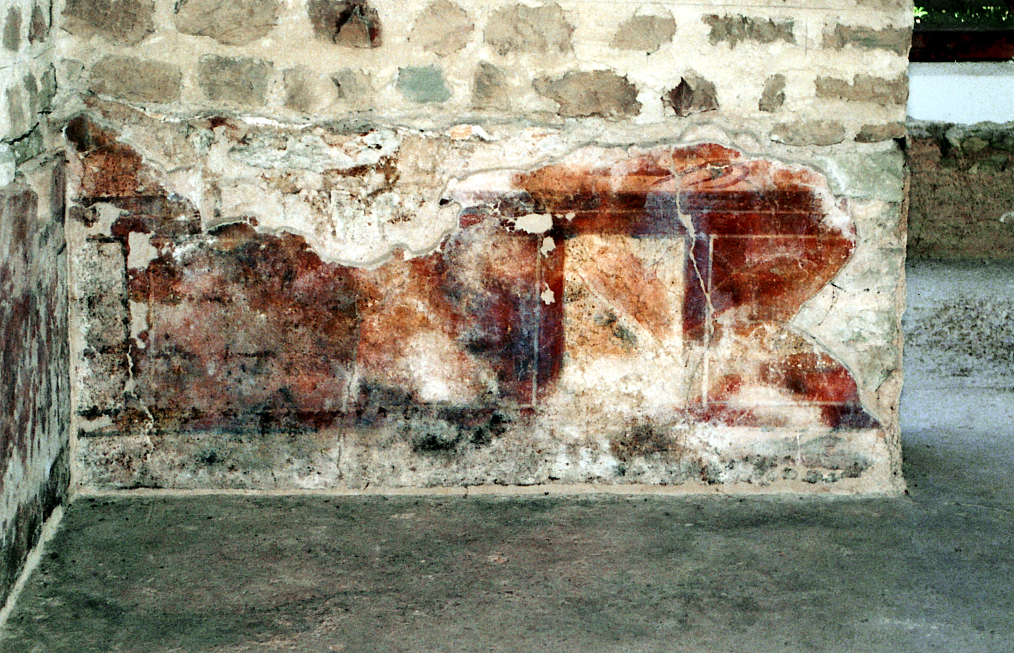 Aufwendig ausgemalter Raum in der nordöstlicher Gebäudeecke der Villa Rustica Ahrweiler. Photographiert mit einer Minolta X 700, einem Tokina 28-70-mm-Objektiv und dem Metz mecablitz 32 CT3 (System SCA 300).